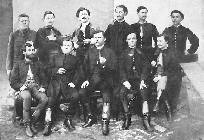 A szatmári színtársulat 1865-ben. Igazgató Kocsisovszy Jusztin.